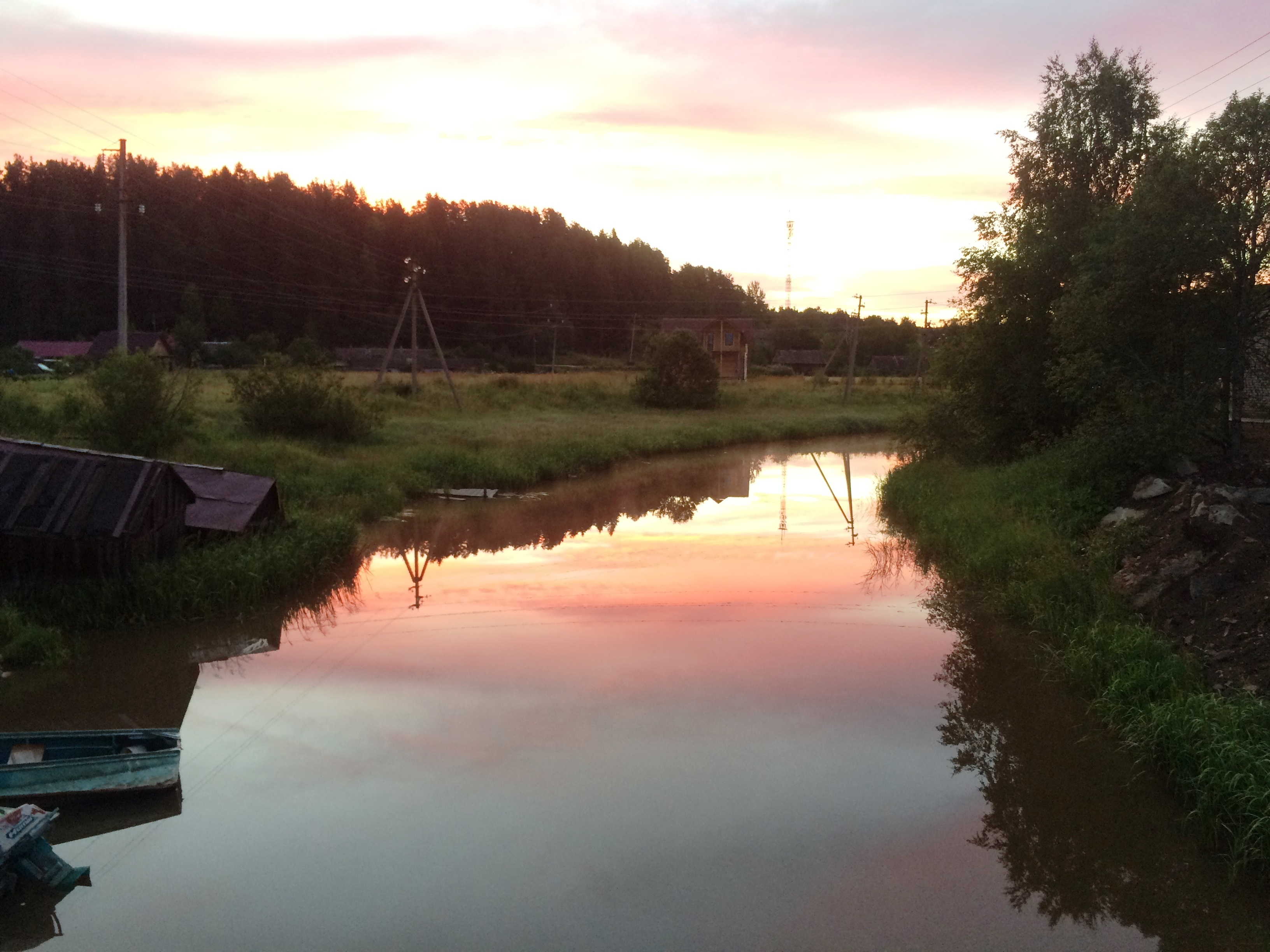 Савийоки